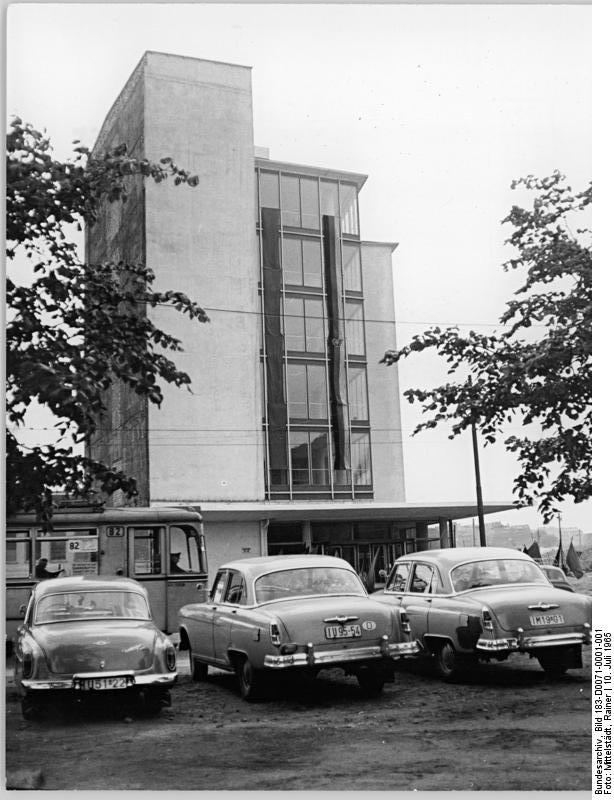 Berlin, Fruchtstraße, Zeitungsvertriebsamt Zentralbild Mittelstädt 10.7.1965 Neues Zeitungsvertriebsamt am 10.7.1965 in der Fruchtstraße in Berlin seiner Bestimmung übergeben. Das moderne fünfstöckige Gebäude aus Stahl, Beton und Glas, wird nun die Arbeit des provisorischen Zeitungsvertriebsamtes in der Clara-Zetkin-Straße übernehmen